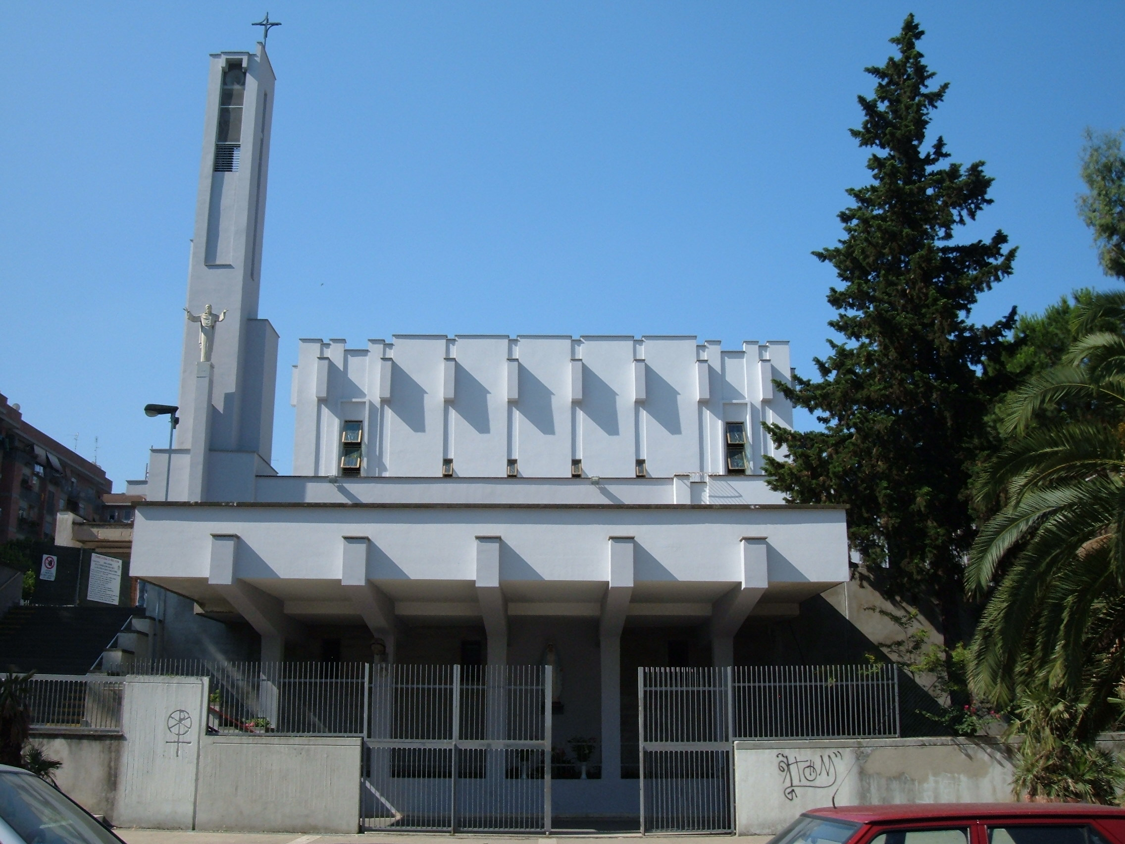 Chiesa di San Gregorio Magno, a Roma, nel quartiere Portuense.